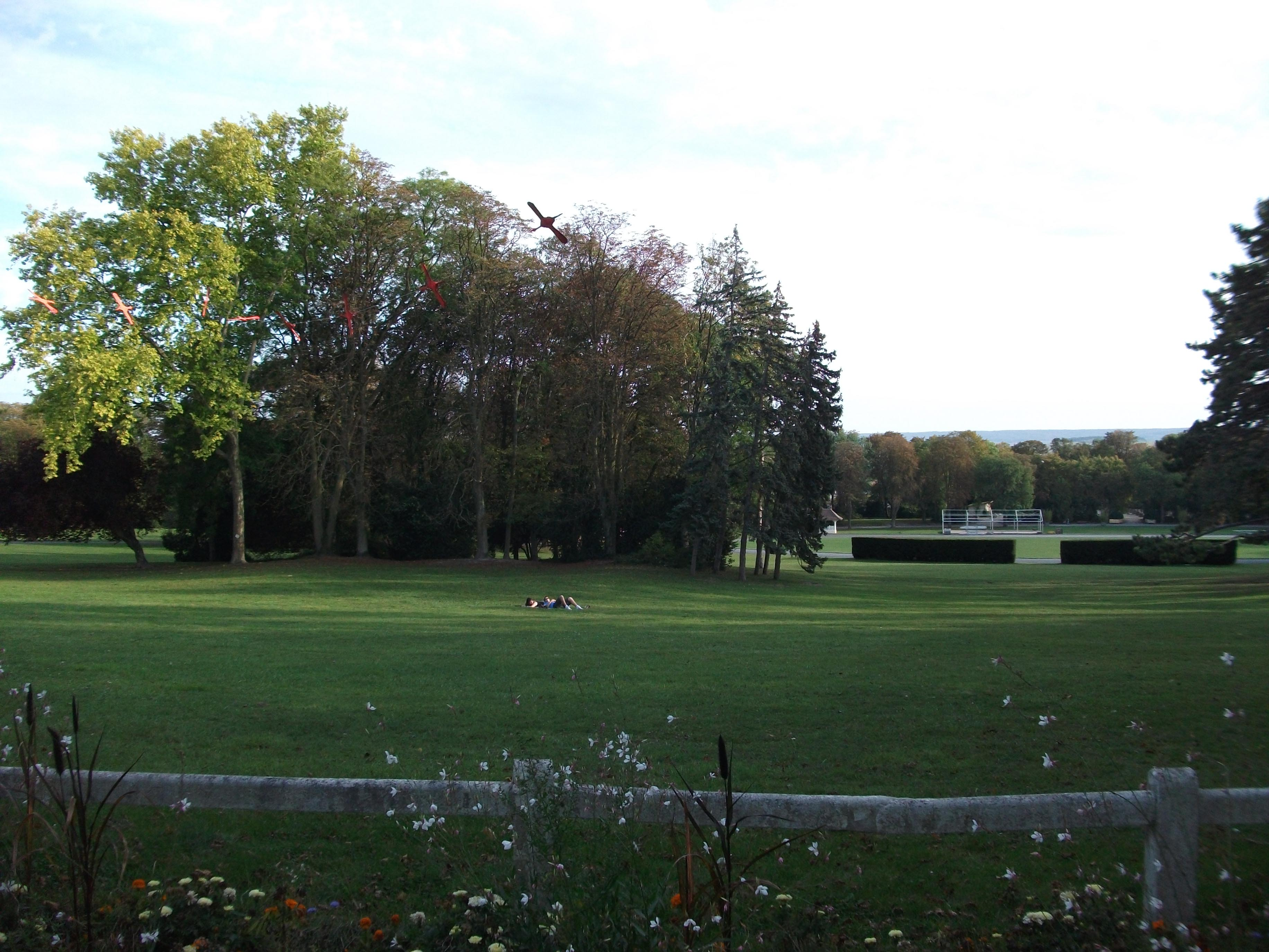 Une vue du Parc de Champagne, en face de son entrée.